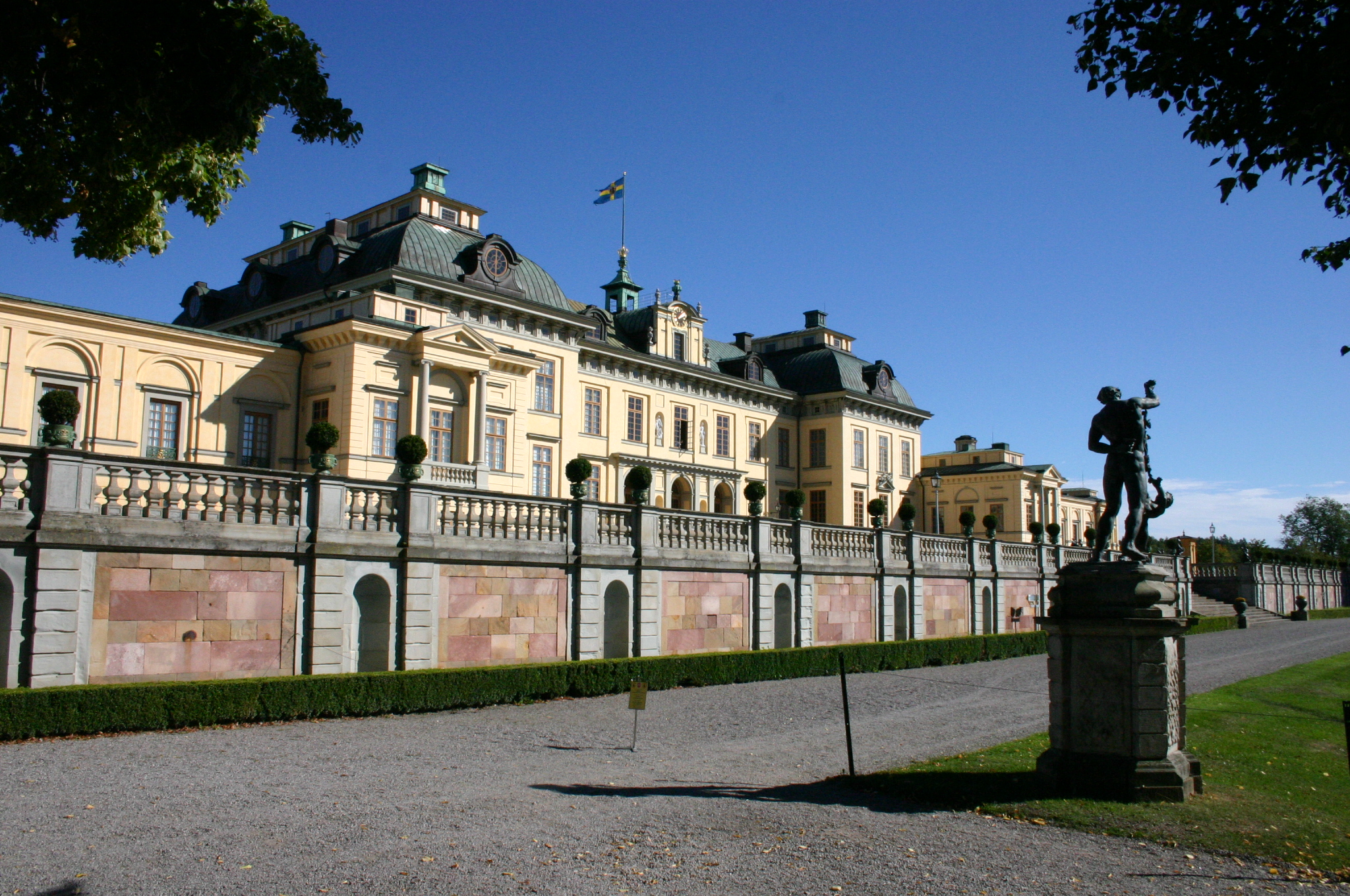 Drottningholms Slott at Stockholm Sweden, a UNESCO World Heritage Site.